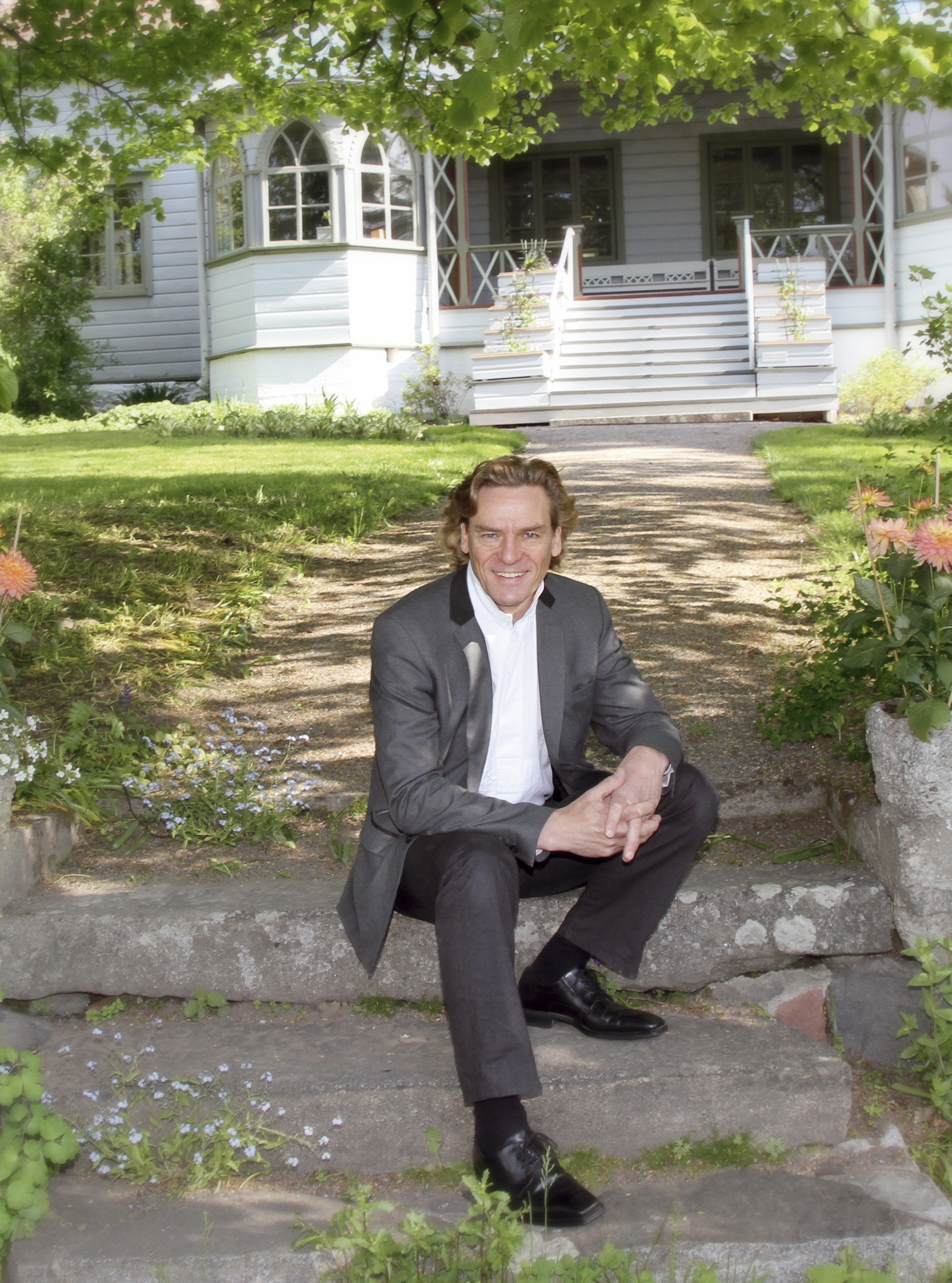 Tuomas Hoikkala Taidekeskus Salmelassa